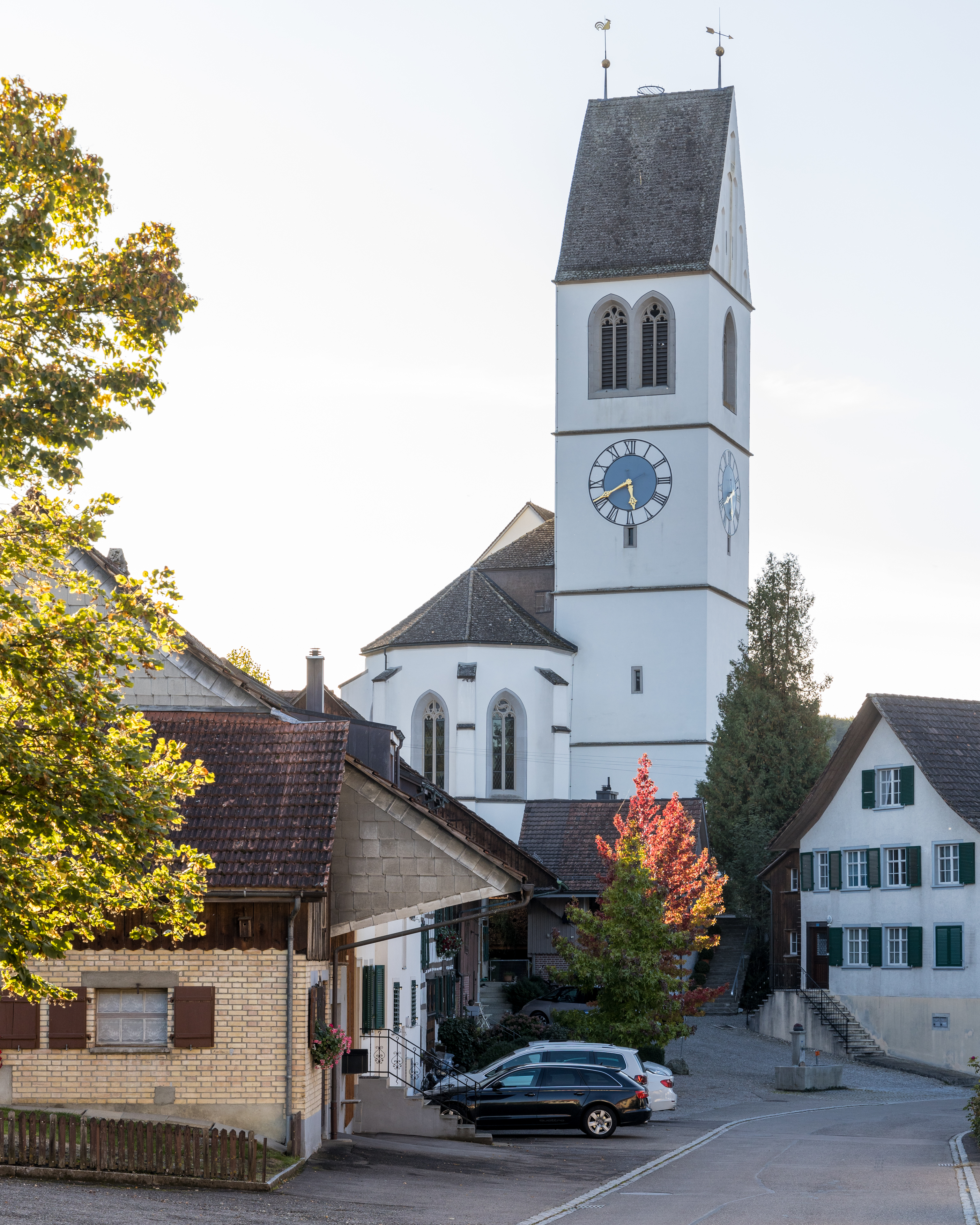 Gachnang TG: Evangelische Kirche St. Pankratius, erbaut 1493.